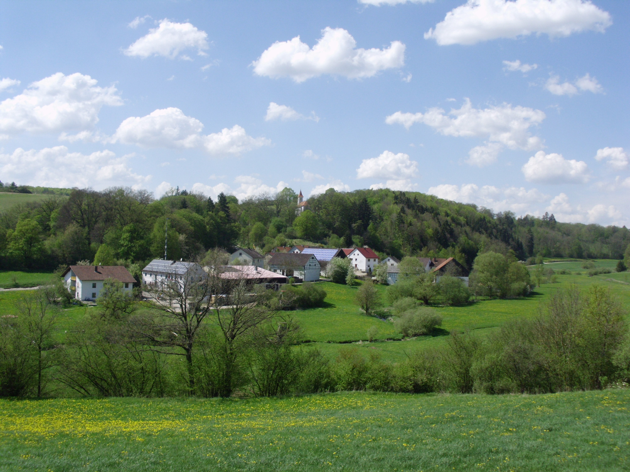 Bürg, Ortsteil von Titting im Landkreis Eichstätt